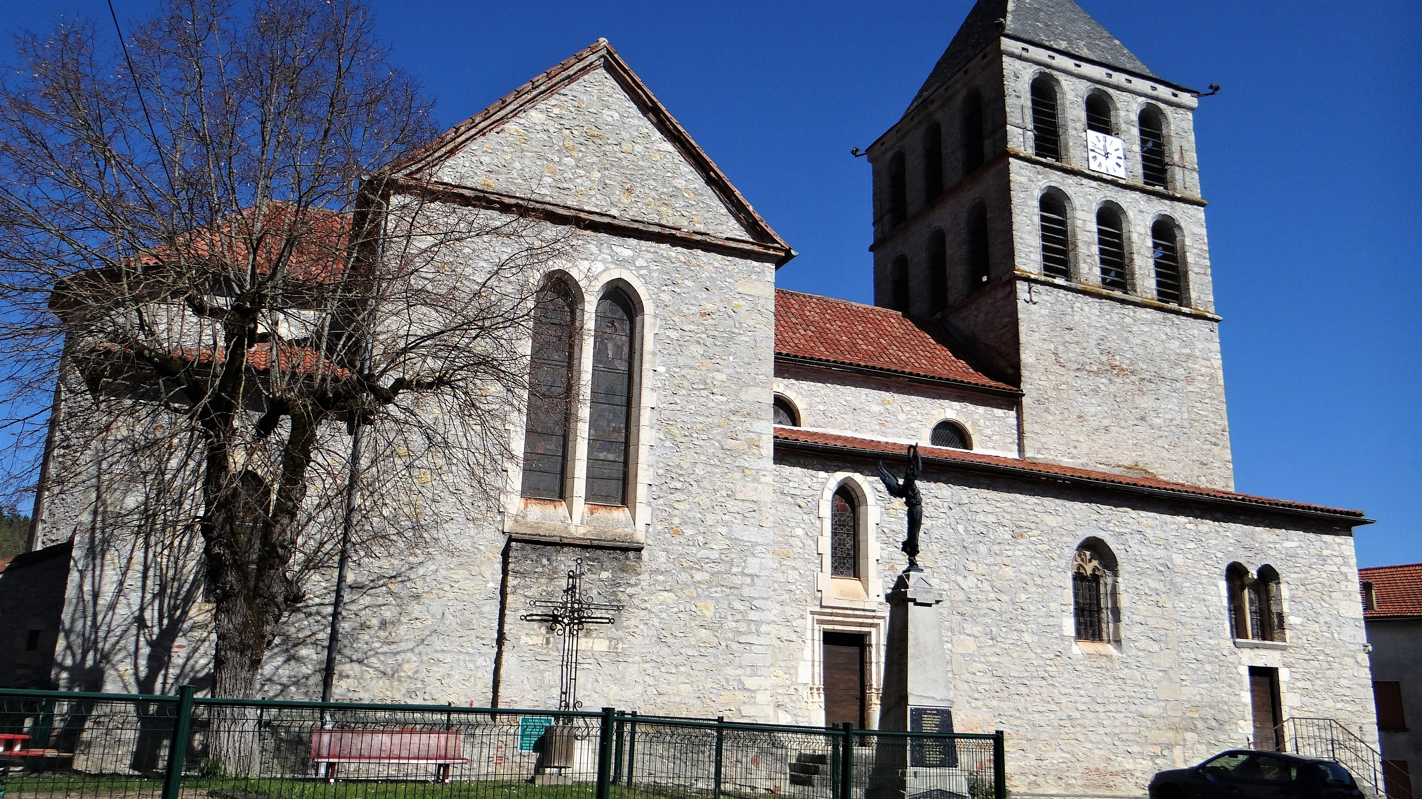 Douelle - Église Notre-Dame-de-l'Assomption - Ensemble extérieur